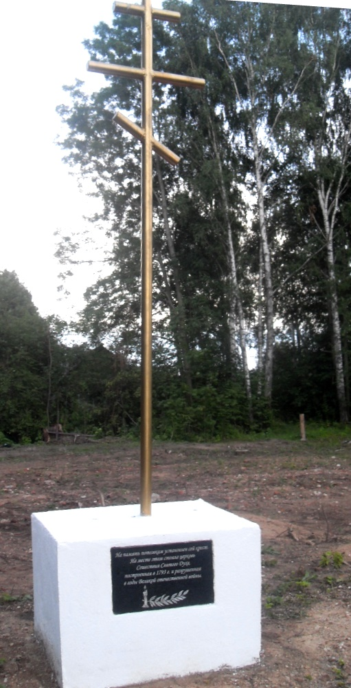 Памятный знак на месте Добейской церкви Сошествия Святого Духа